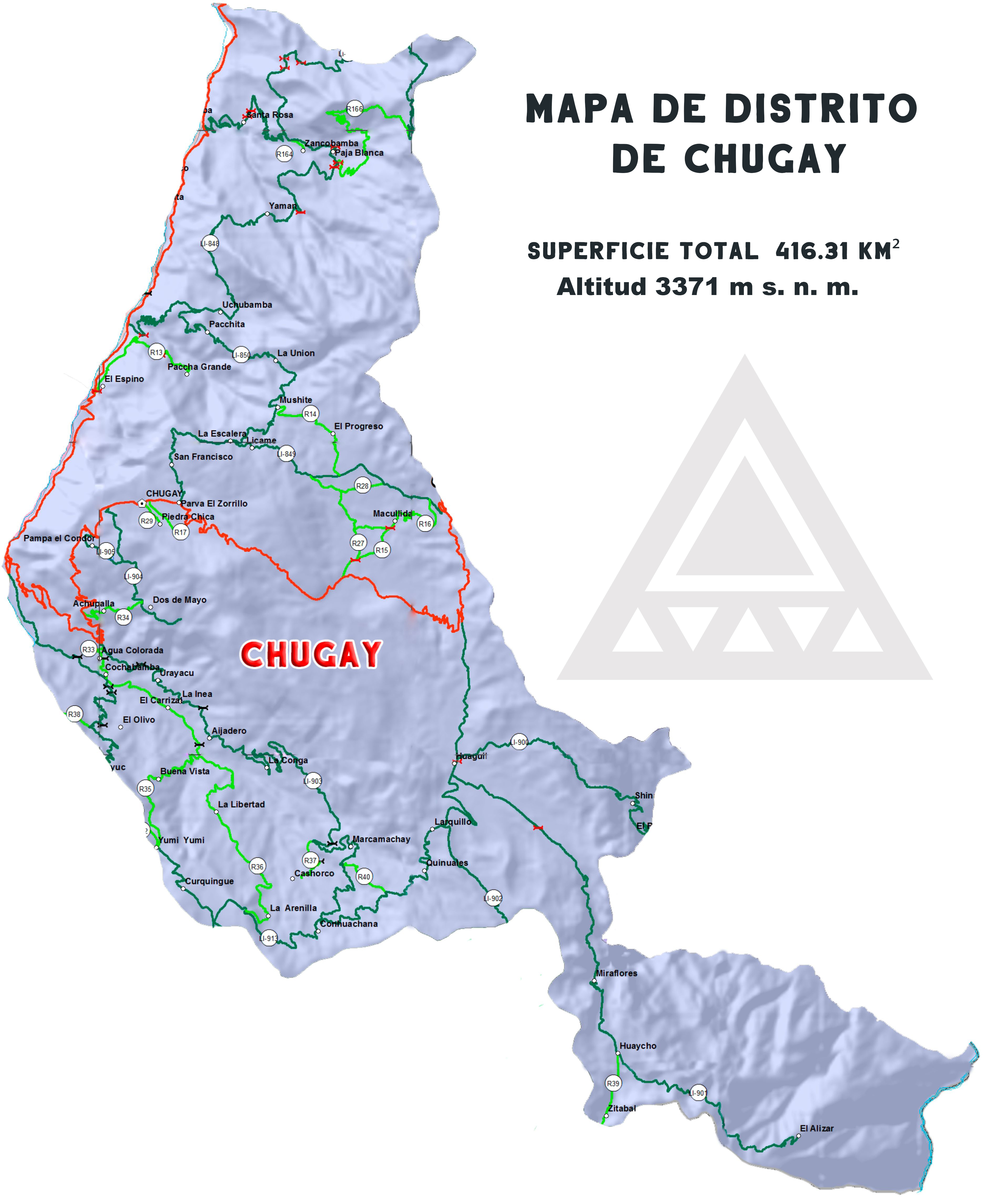 Mapa vial de Chugay